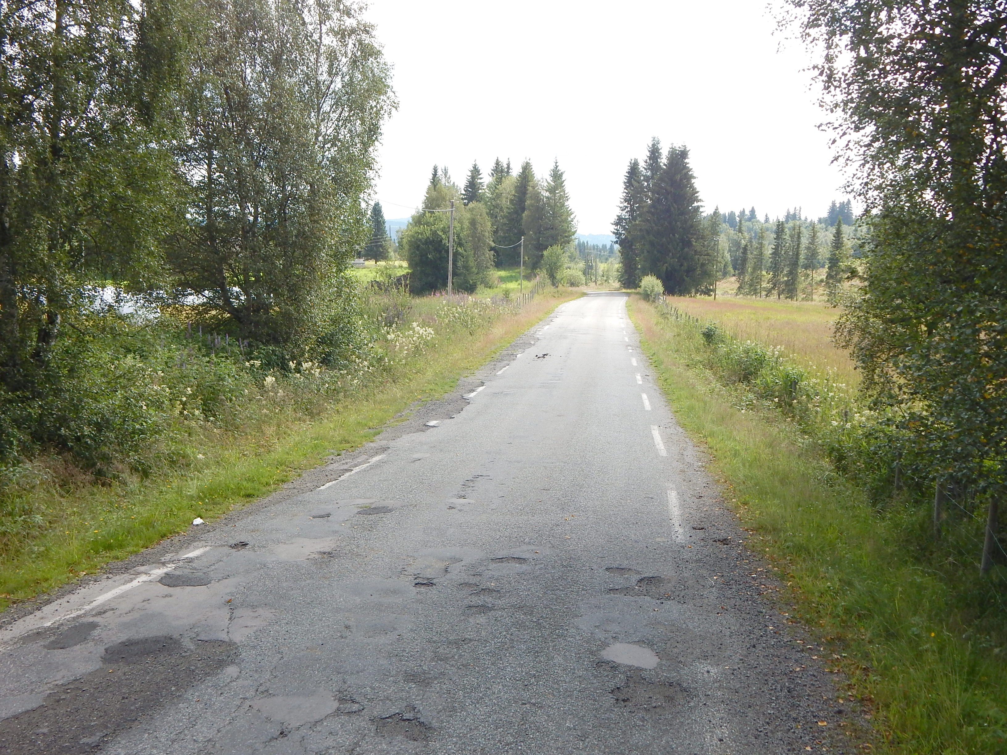 Puffen (fylkesvei 2390, tidl. 134) mellom Vølstad og Landåsbygda